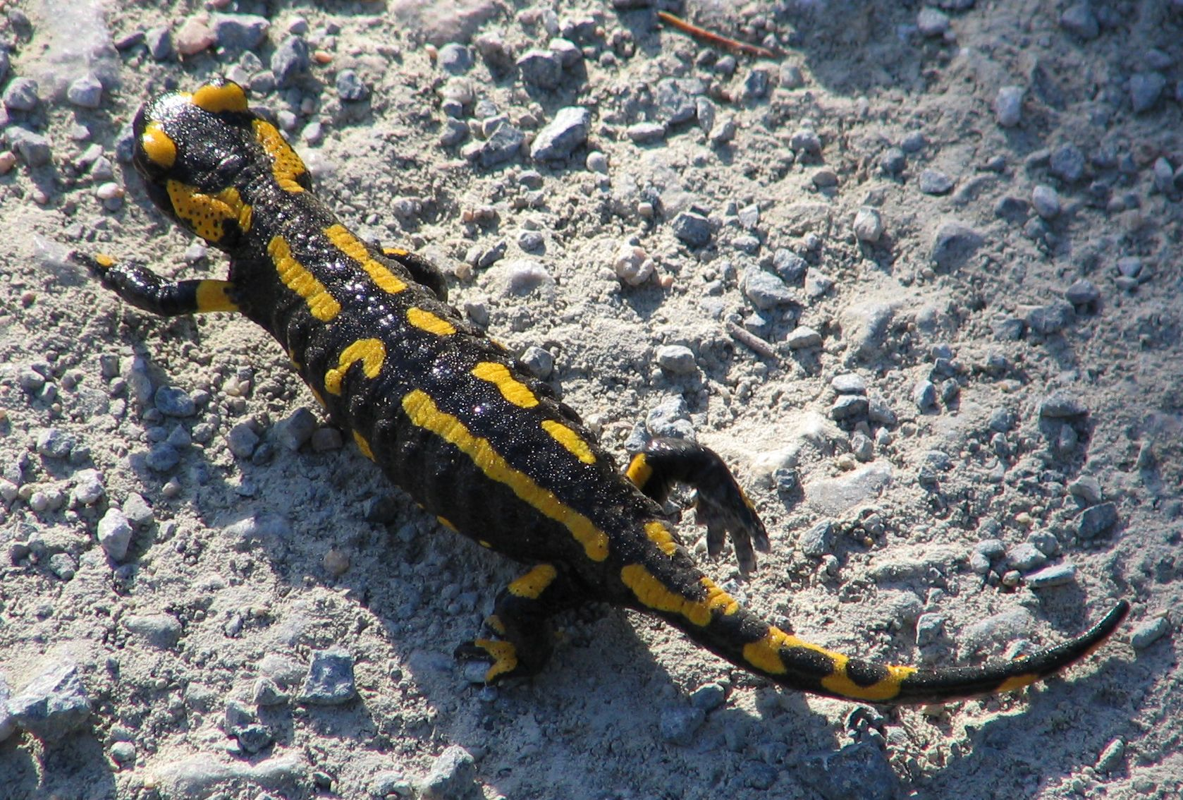 Salamandra salamandra